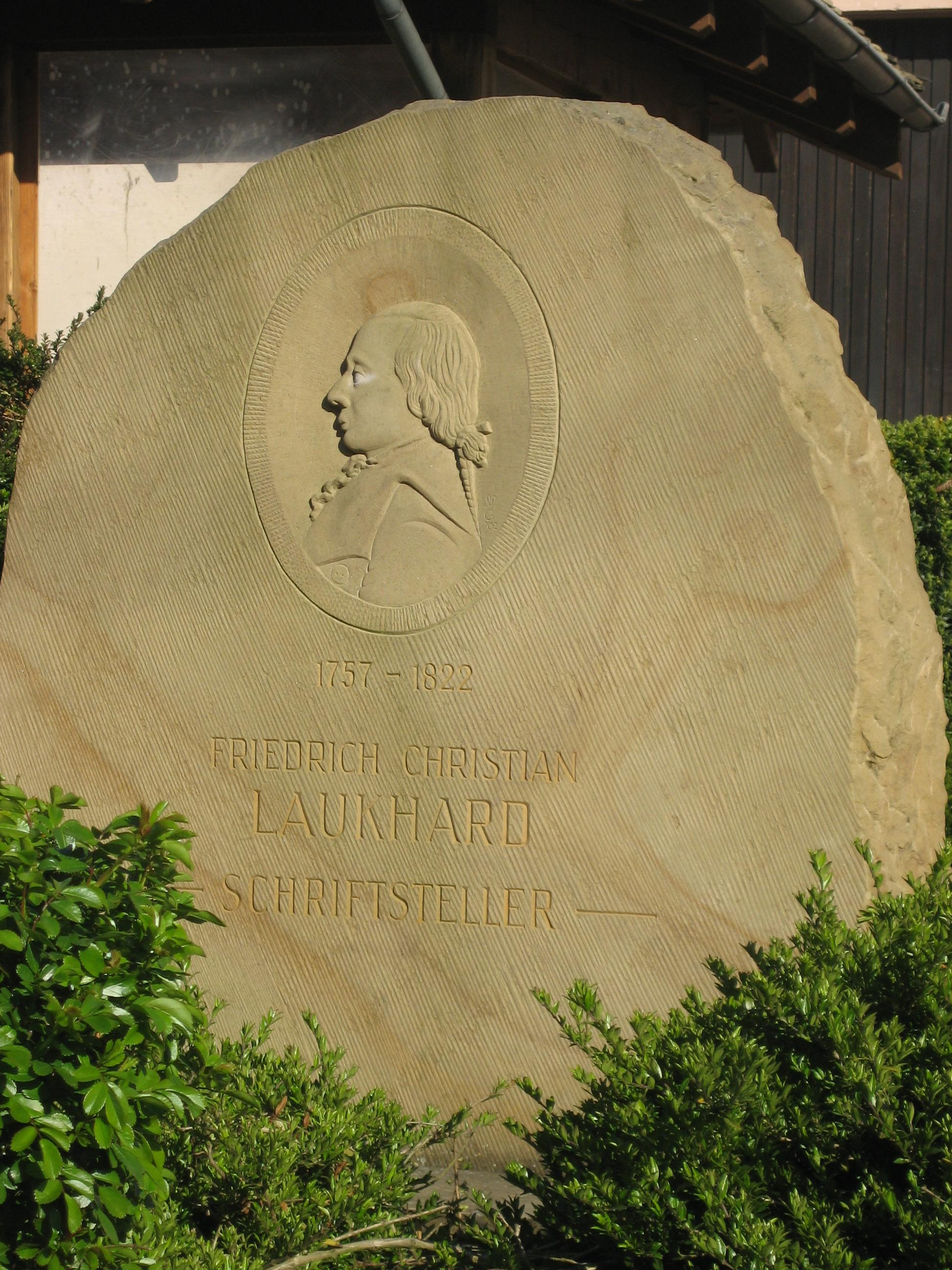 Friedrich Christian Laukhard Memorial in Wendelsheim